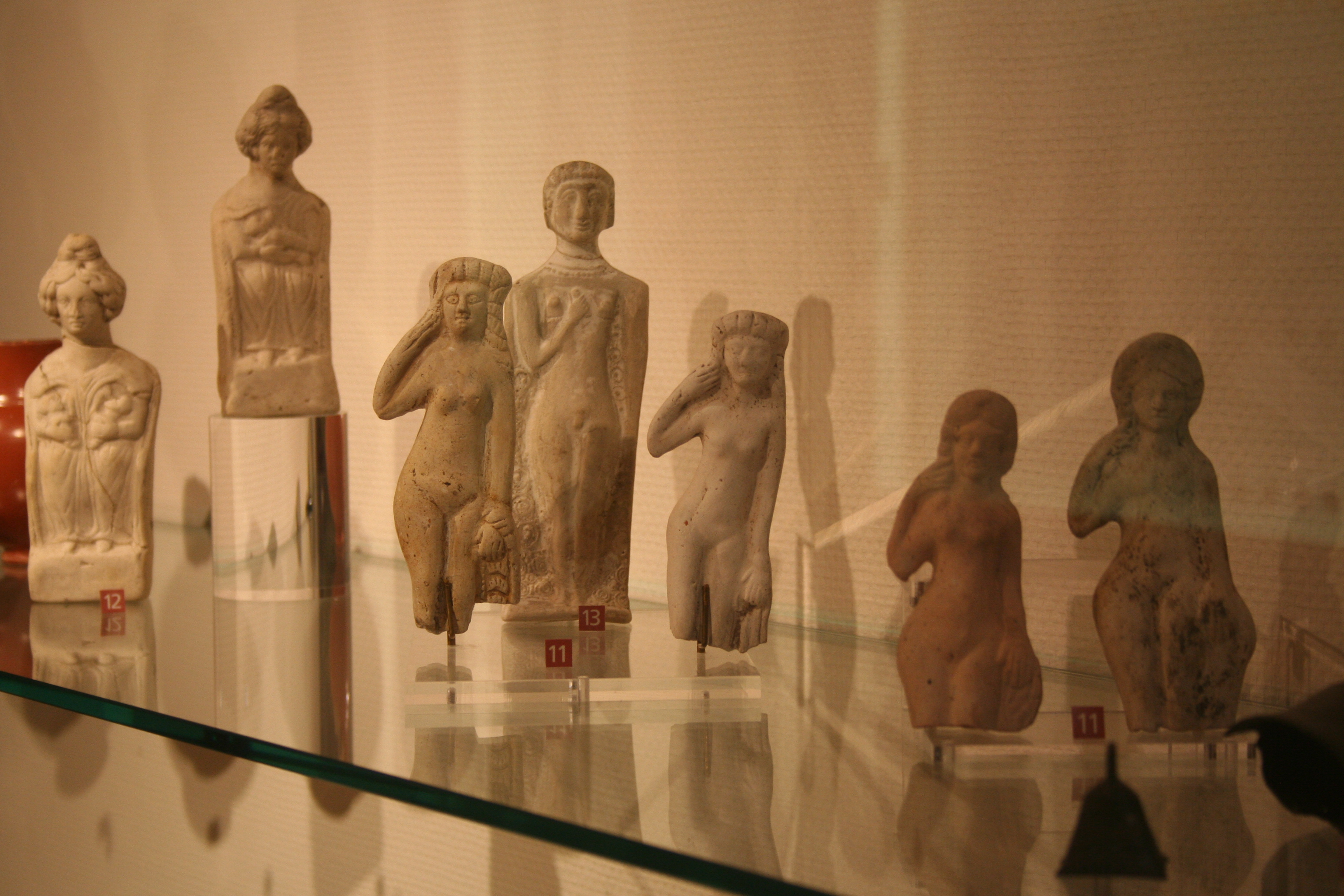 statuettes de Venus gallo-romaines